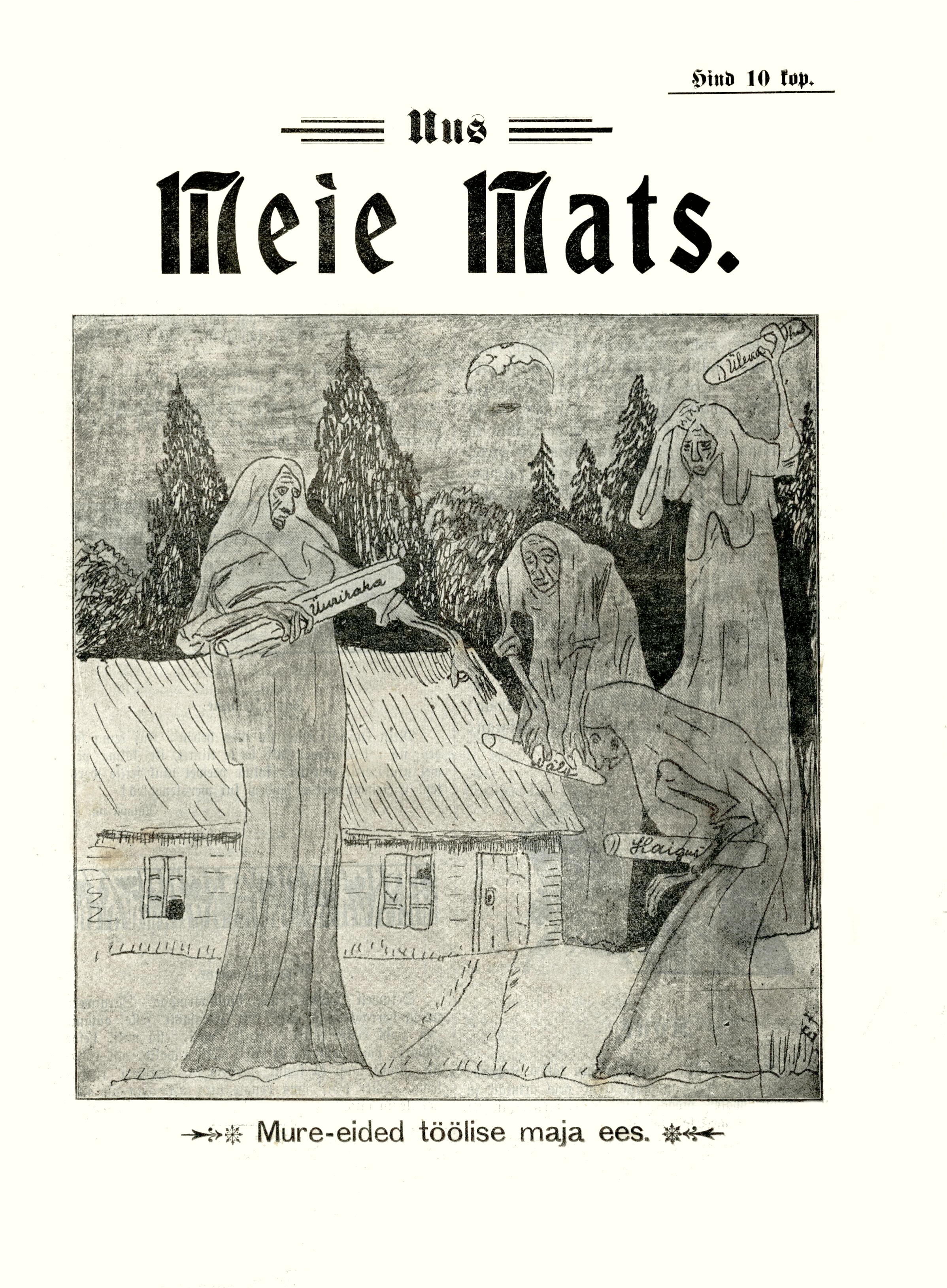 Ajakirja Uus Meie Mats esikaas